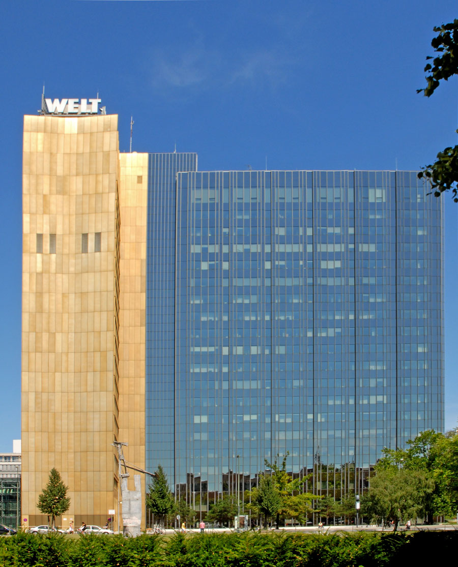 La maison d'édition Axel Springer architectes : Melchiorre Bega, Gino Franzi, Franz Heinrich Sobotka, Gustav Müller (1961-1966) pour la partie gauche dorée construite très près du mur de Berlin. architectes : Gerhard Stössner, Thomas Fisher, Berlin (1992-1994) pour l'extension en verre destinée à accueillir la rédaction du quotidien "Die Welt".